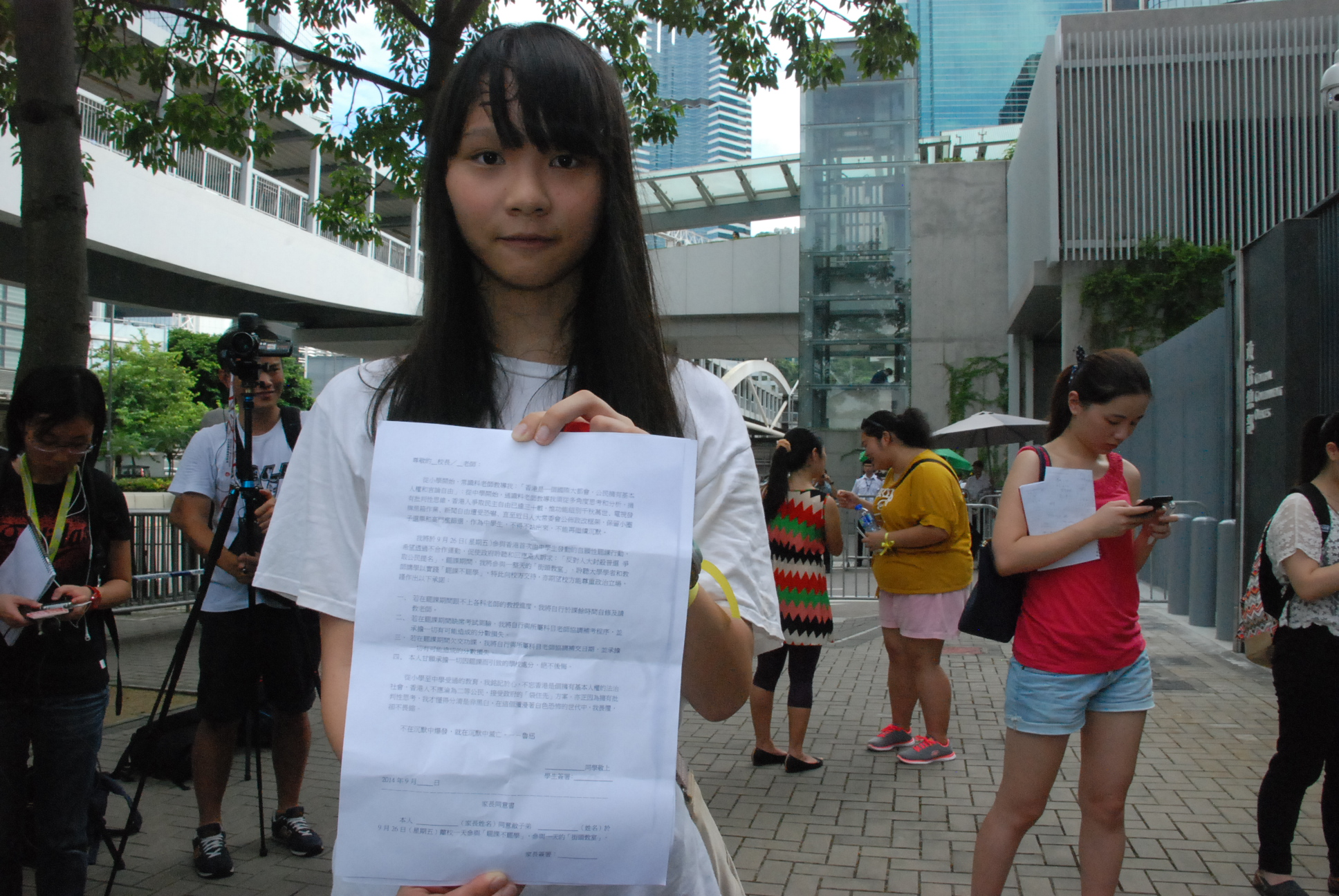 學民思潮發言人周庭展示中學生罷課承諾書，在家長簽署同意下，學生承諾罷課並非曠課，而是透過參與不合作運動爭取真普選